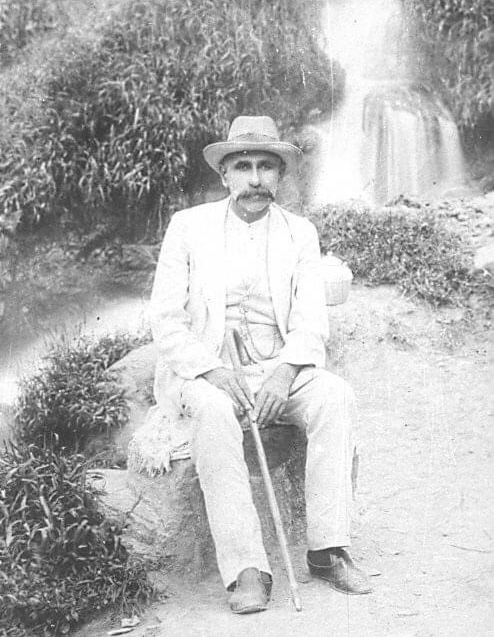 Hashim bey Vezirov (1868—1916)